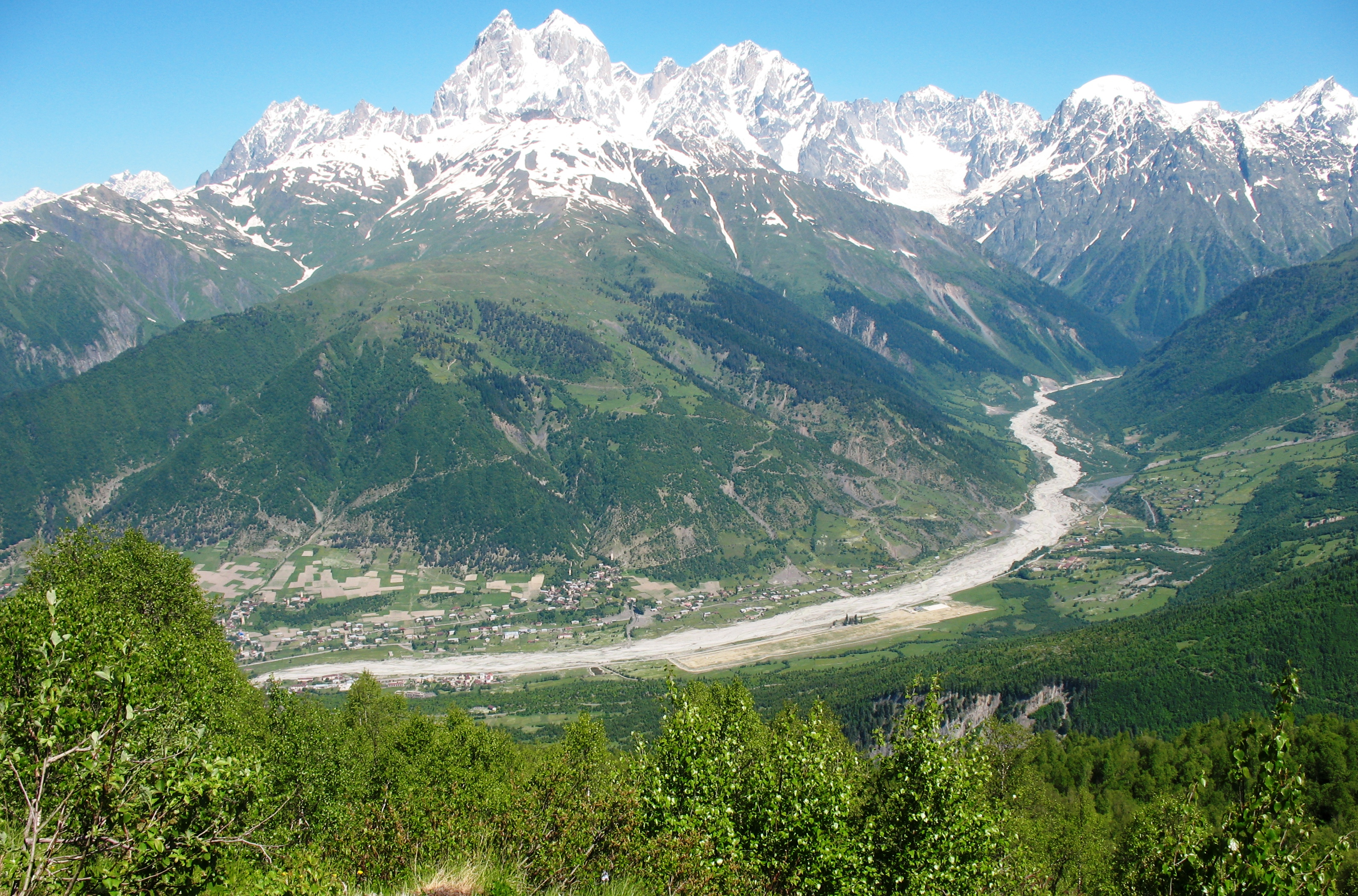 ხედი ზურულდის მთიდან.